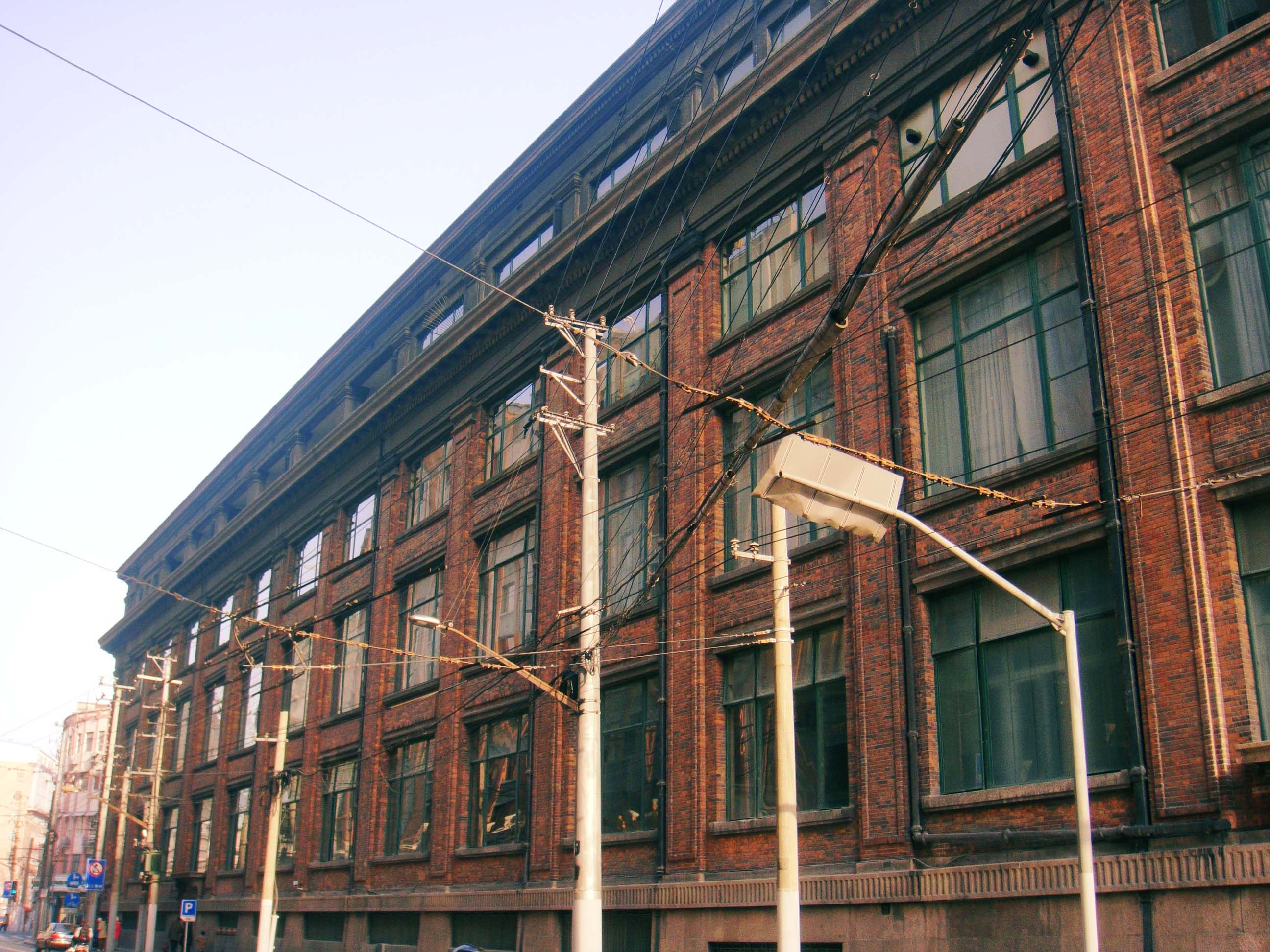 总局大楼位于天潼路一面，所使用的有机红砖墙